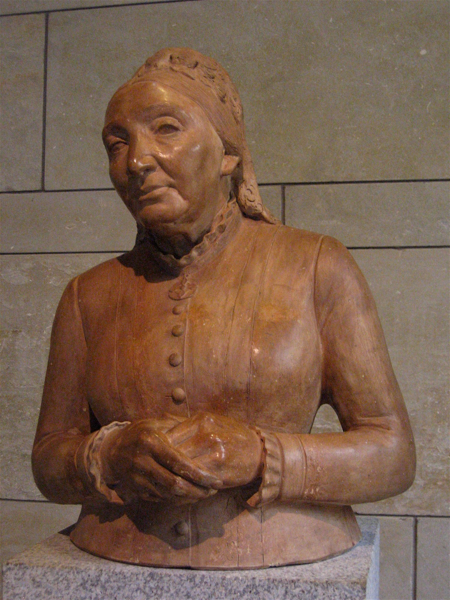 Adolf von Hildebrand: Marie Louise Fiedler, 1882, in der Neuen Pinakothek in München